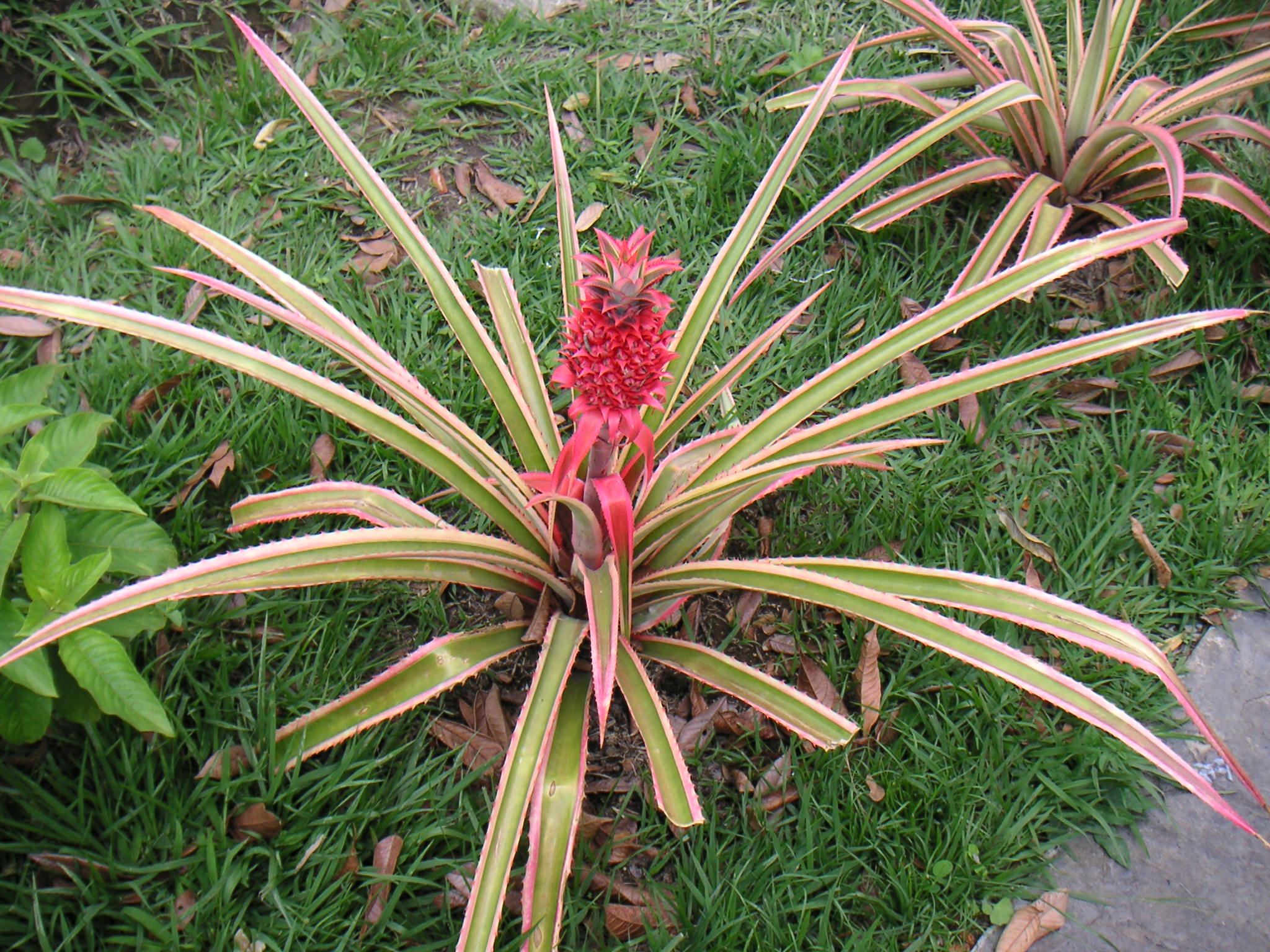 Ananaspflanze (Ananas comosus var. variegatus), Parque del Café, Quindio / Kolumbien